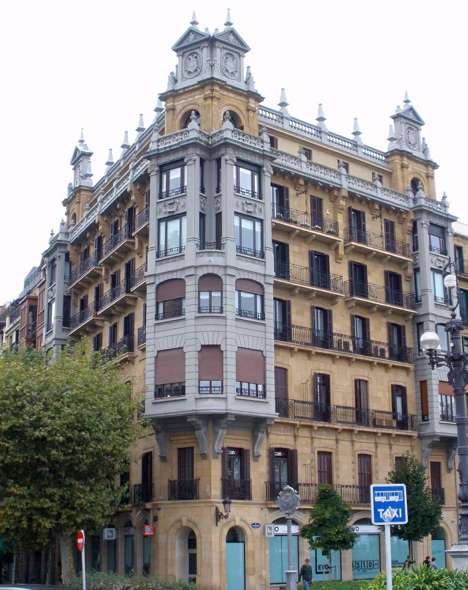 San Sebastián-Donostia